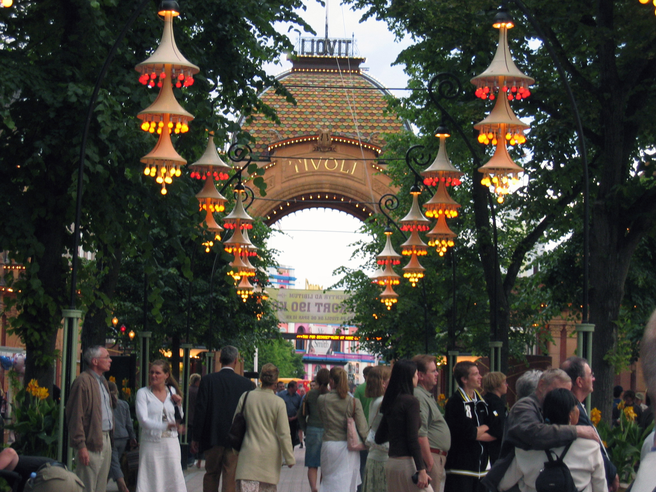 Tivoli København utgang til Vesterbrogade